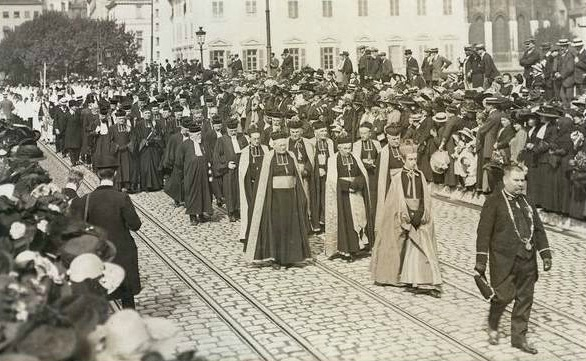 Recteur et doyens de la Faculté catholique de Lyon lors des funérailles du cardinal Coullié le 17 septembre 1912 (carte postale ancienne).